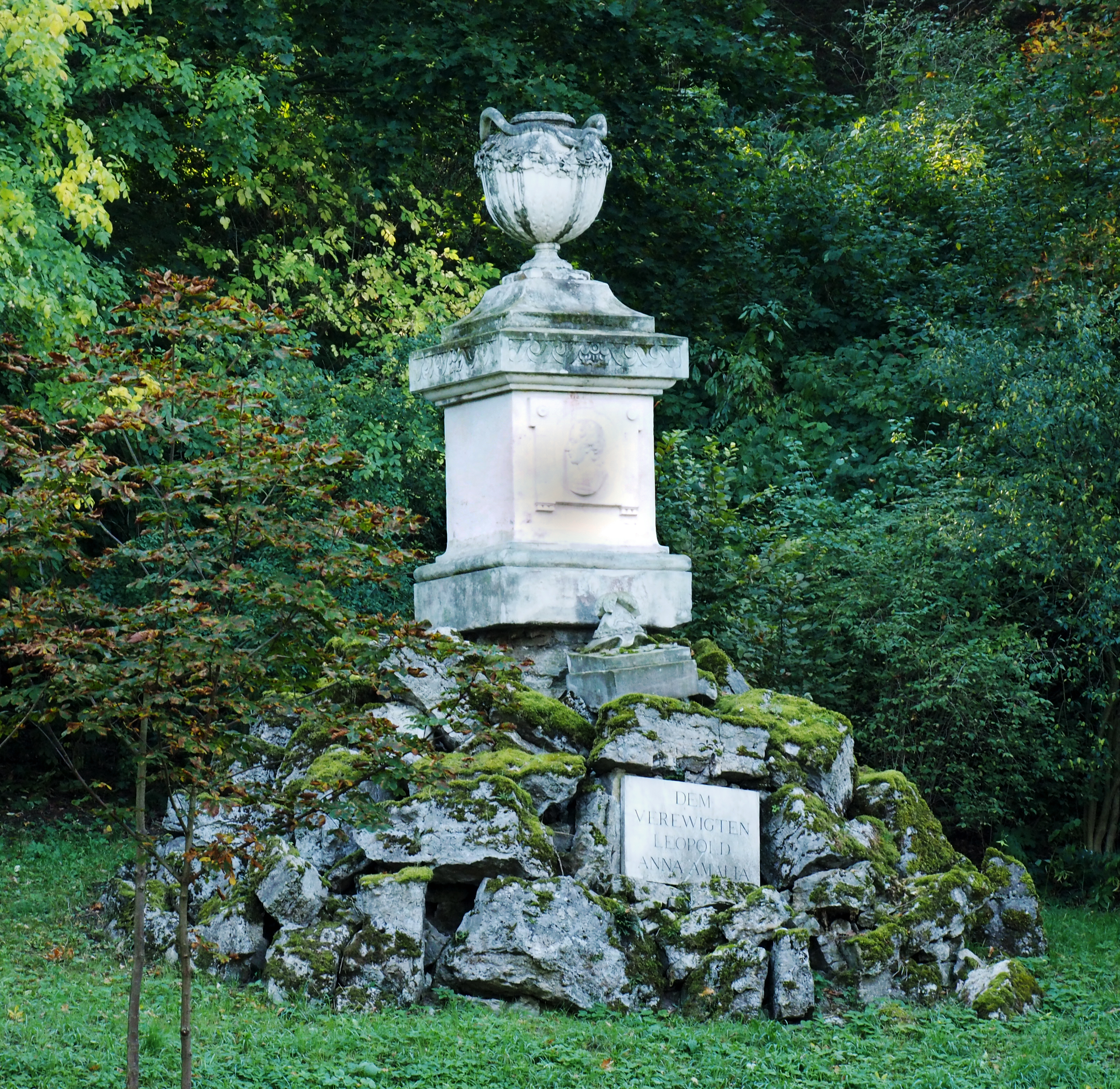 Denkmal für Leopold, Duke of Brunswick-Wolfenbüttel im Schlosspark Tiefurt